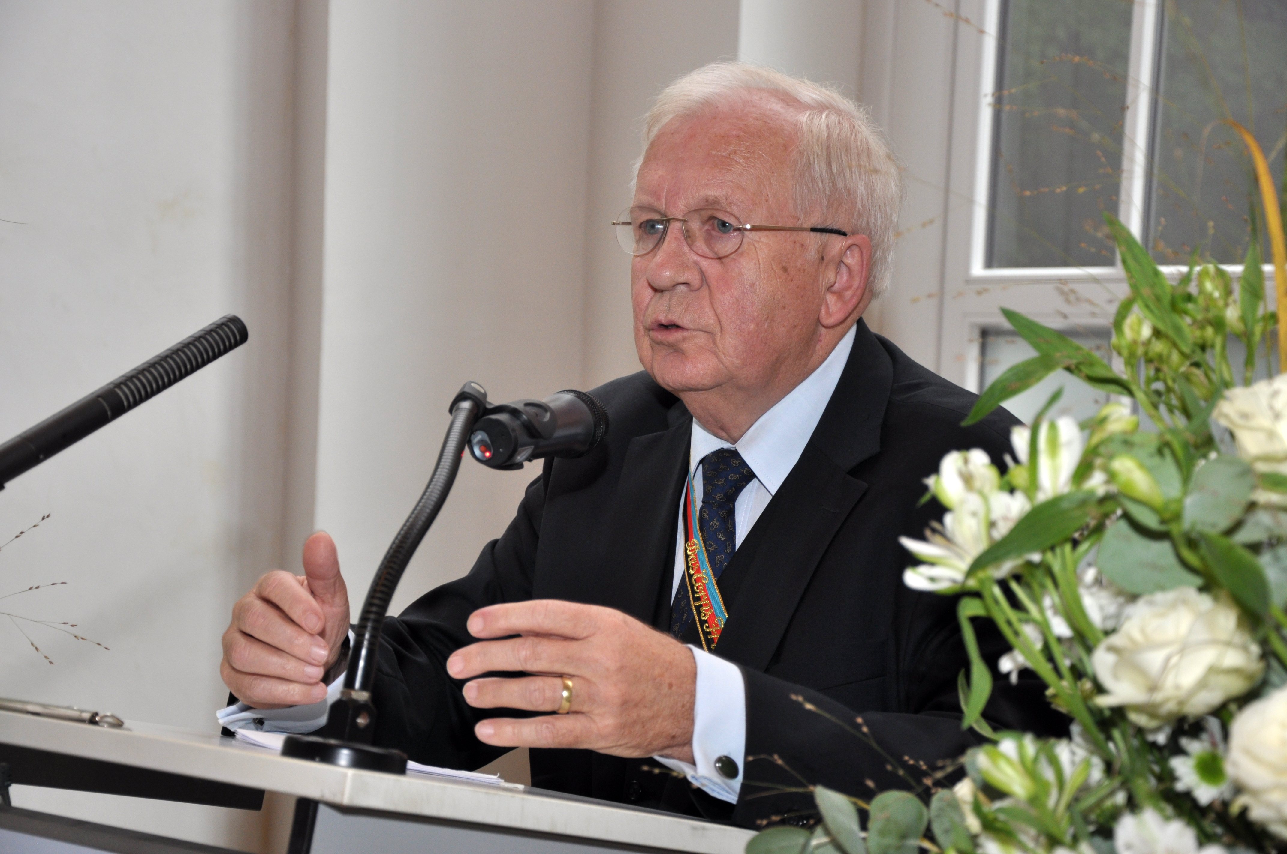 Der Jurist und ehemalige Politiker George Turner (Corps Frisia Göttingen) bei einem Vortrag zum 350-jährigen Jubiläum der Christian-Albrechts-Universität zu Kiel im Kieler Yachtclub.